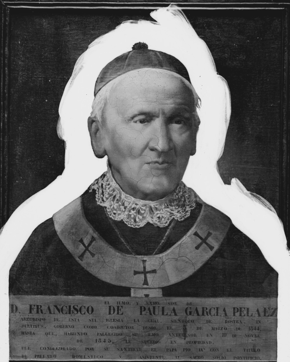 Arzobispo de Guatemala. Francisco de Paula García y Pelaez.